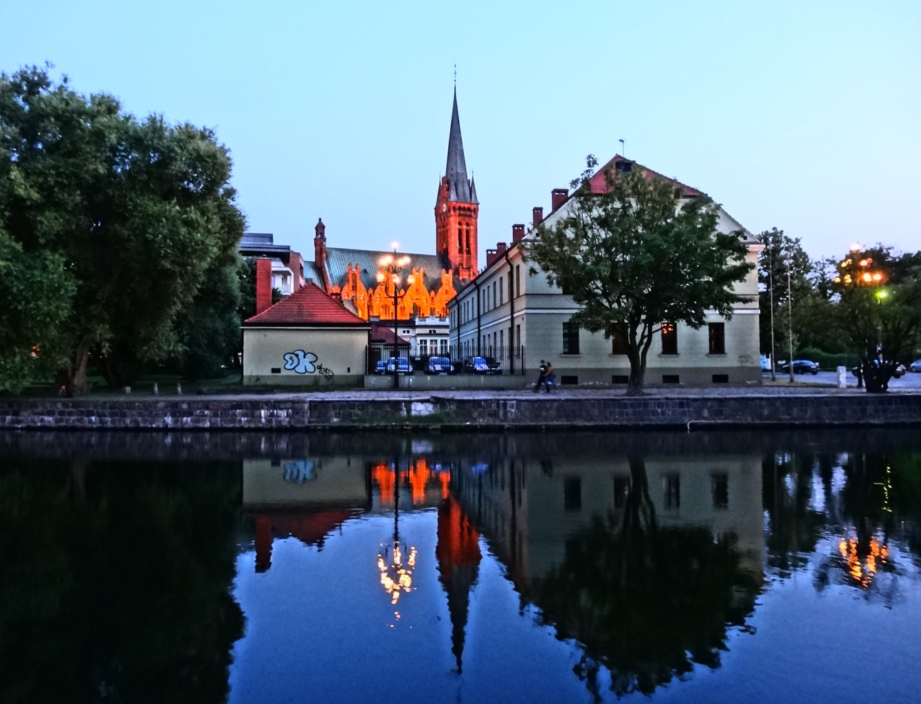 Budynek przy ul. Grodzkiej 25 w Bydgoszczy - dawny bud. administracyjny rafinerii cukru trzcinowego, zbud. w końcu XVIII w. nad Brdą